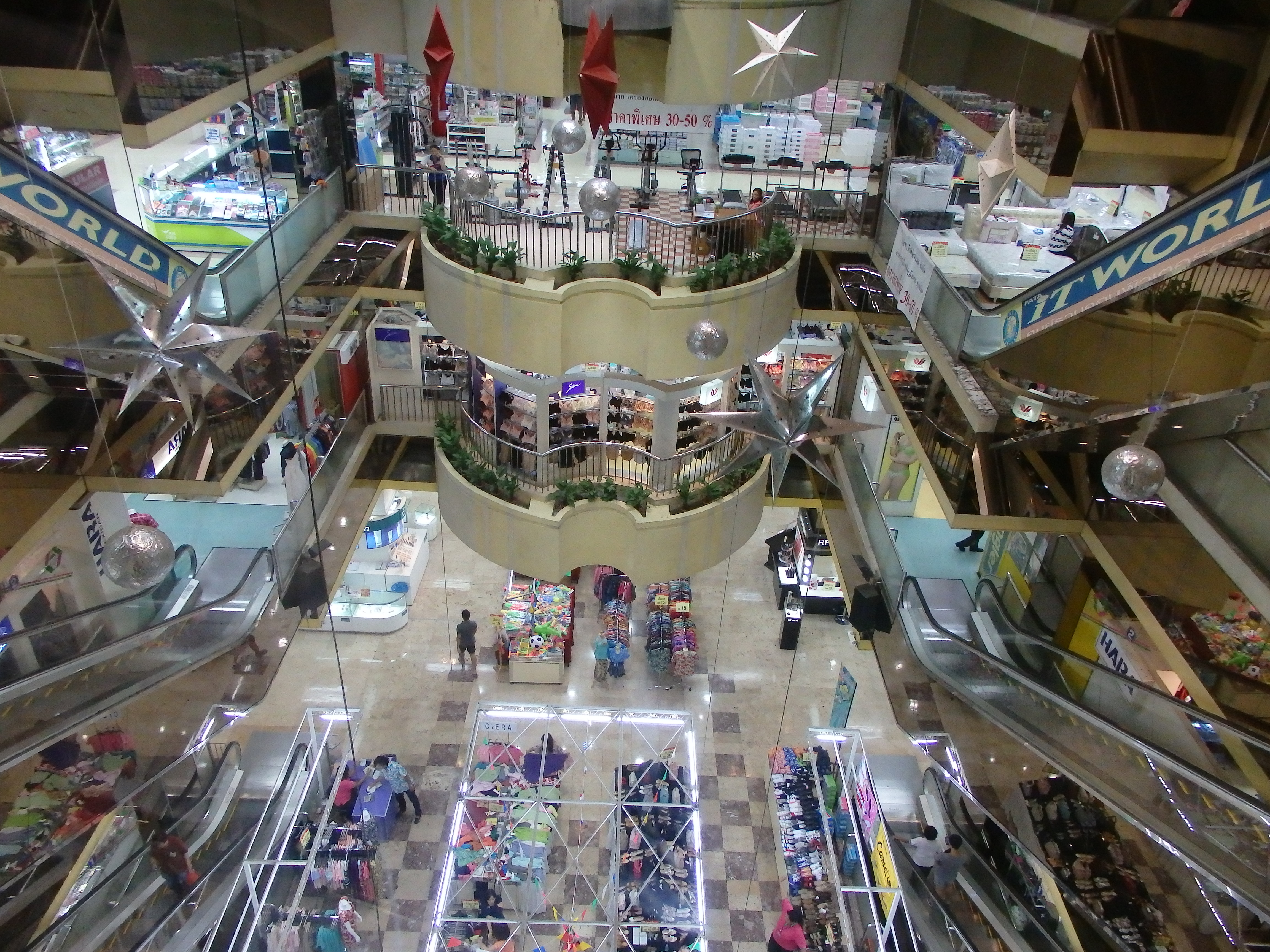 Bang Yi Khan, Bang Phlat, Bangkok 10700, Thailand